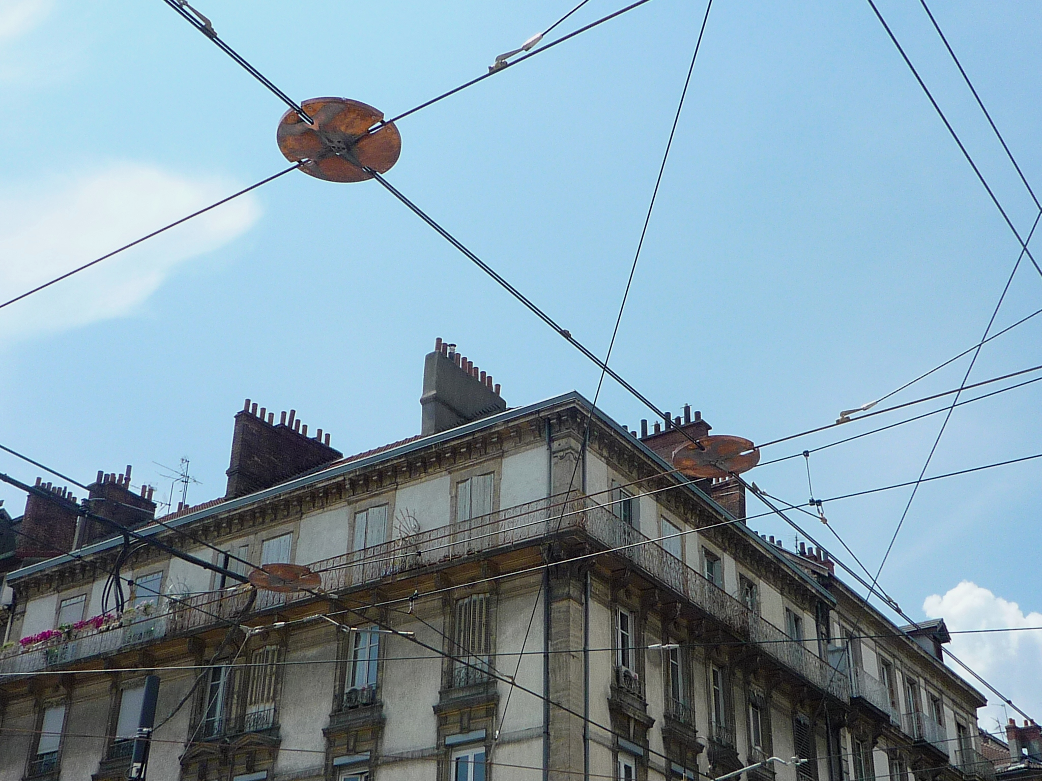 Galettes de croisement des câbles des lignes de tramway A et E ; angle de l'avenue Alsace-Lorraine et du cours Jean-Jaurès à Grenoble